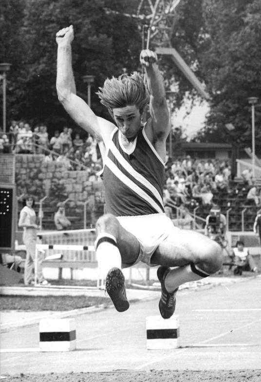 Henry Lauterbach ADN-ZB Demme 2.8.81 Erfurt: DVfL-Sportfest-Sieger im Weitsprung wurde am zweiten Wettkampftag Henry Lauterbach (Mitte) mit 8,35 m.